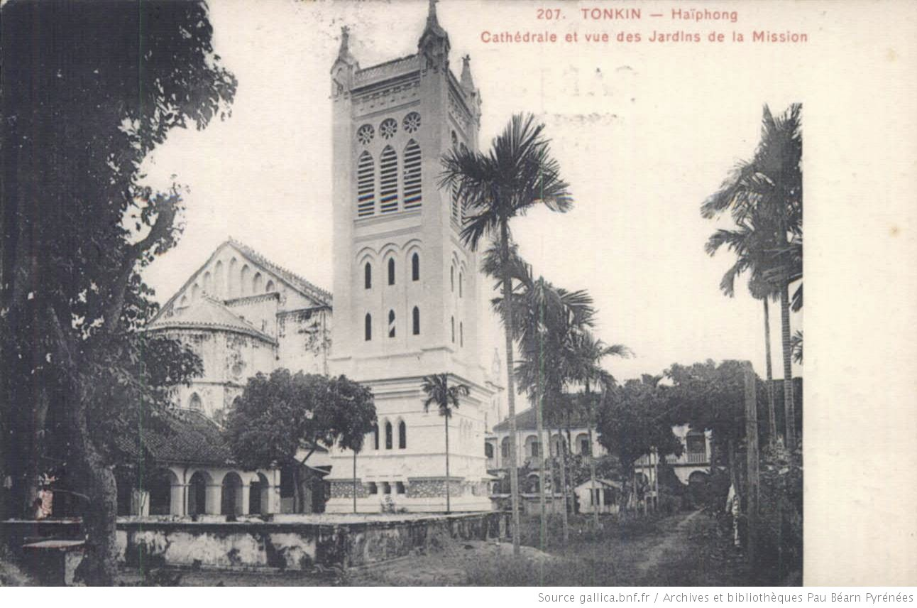 Nhà thờ chánh tòa Hải Phòng vào đầu thế kỷ XX